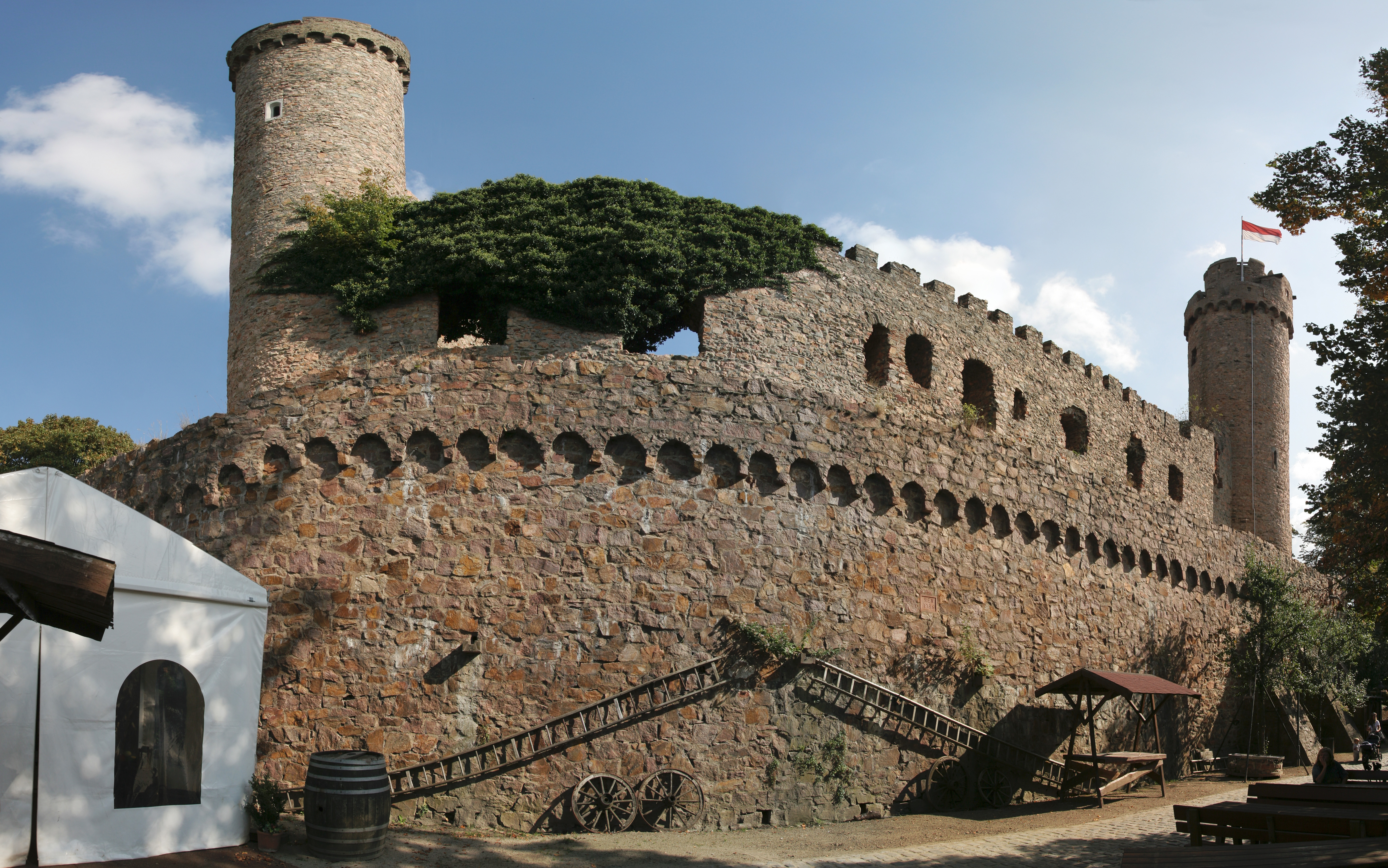 Das Auerbacher Schloss. Die Westseite der Burganlage. 180° Panorama aus 12 Einzelaufnahmen mit Hugin zusammengesetzt.